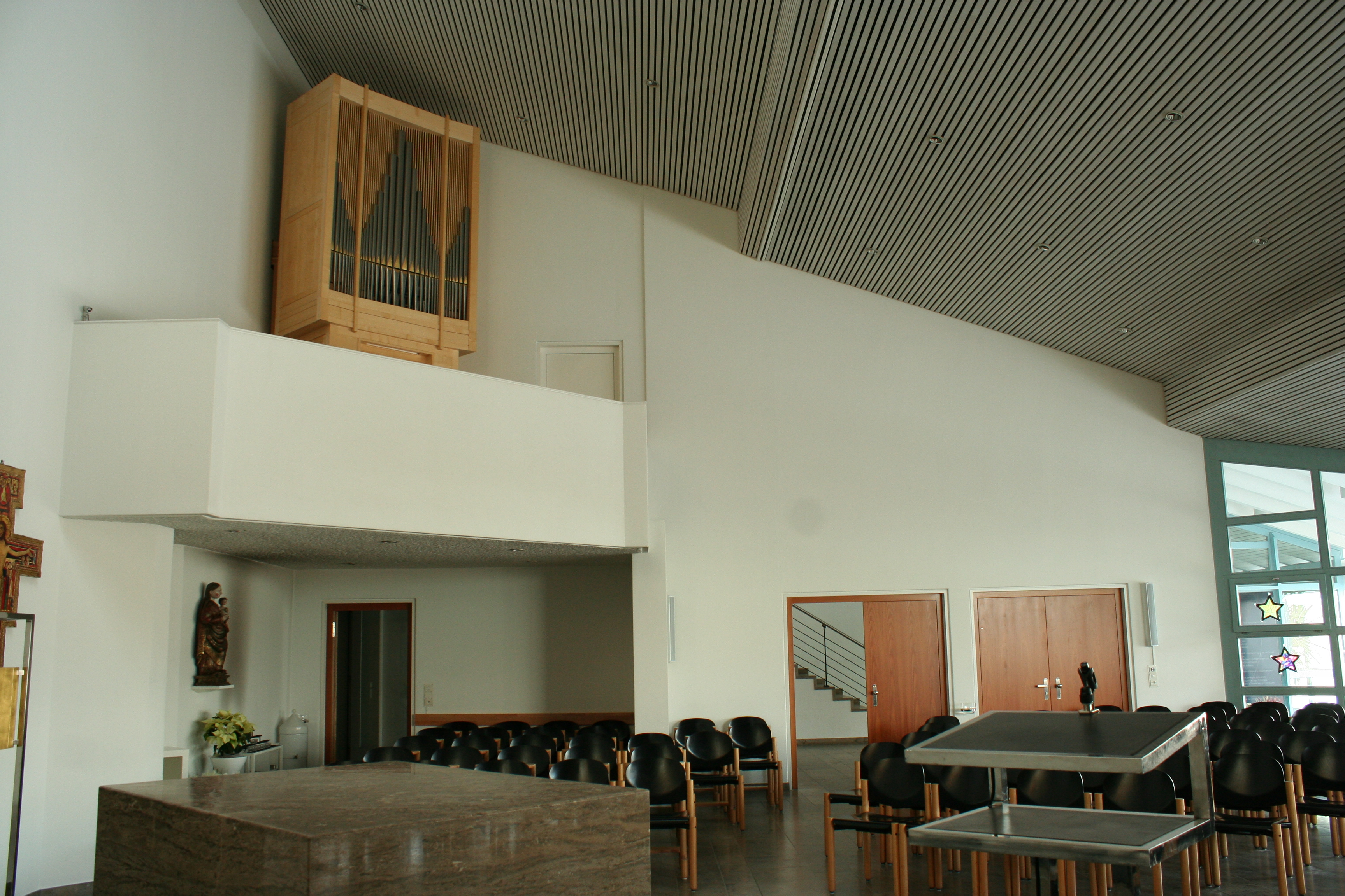 Römisch-katholische Kirche St. Franziskus Maur-Ebmatingen, Orgelempore